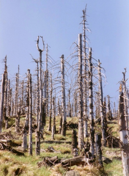 Neuartige Waldschäden („Waldsterben“): Abgestorbene Fichten im tschechischen Erzgebirge.